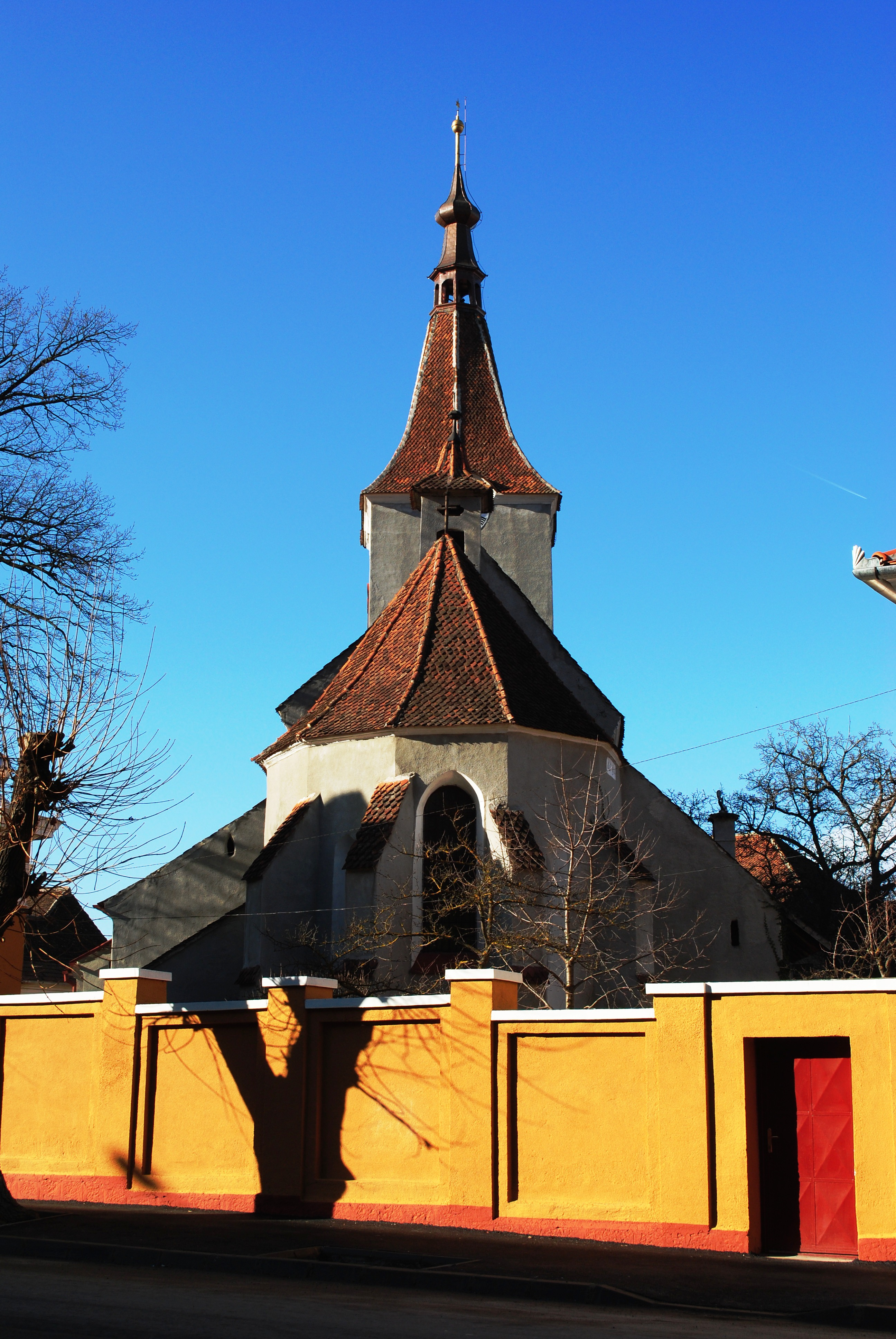 Ansamblul bisericii evanghelice, sec. XIII - XVIII